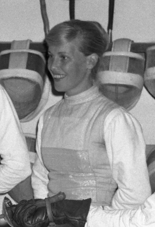 Nederlandse damesschermploeg voor de Olympische Spelen de schermzaal te Rotterdam, Kokkes